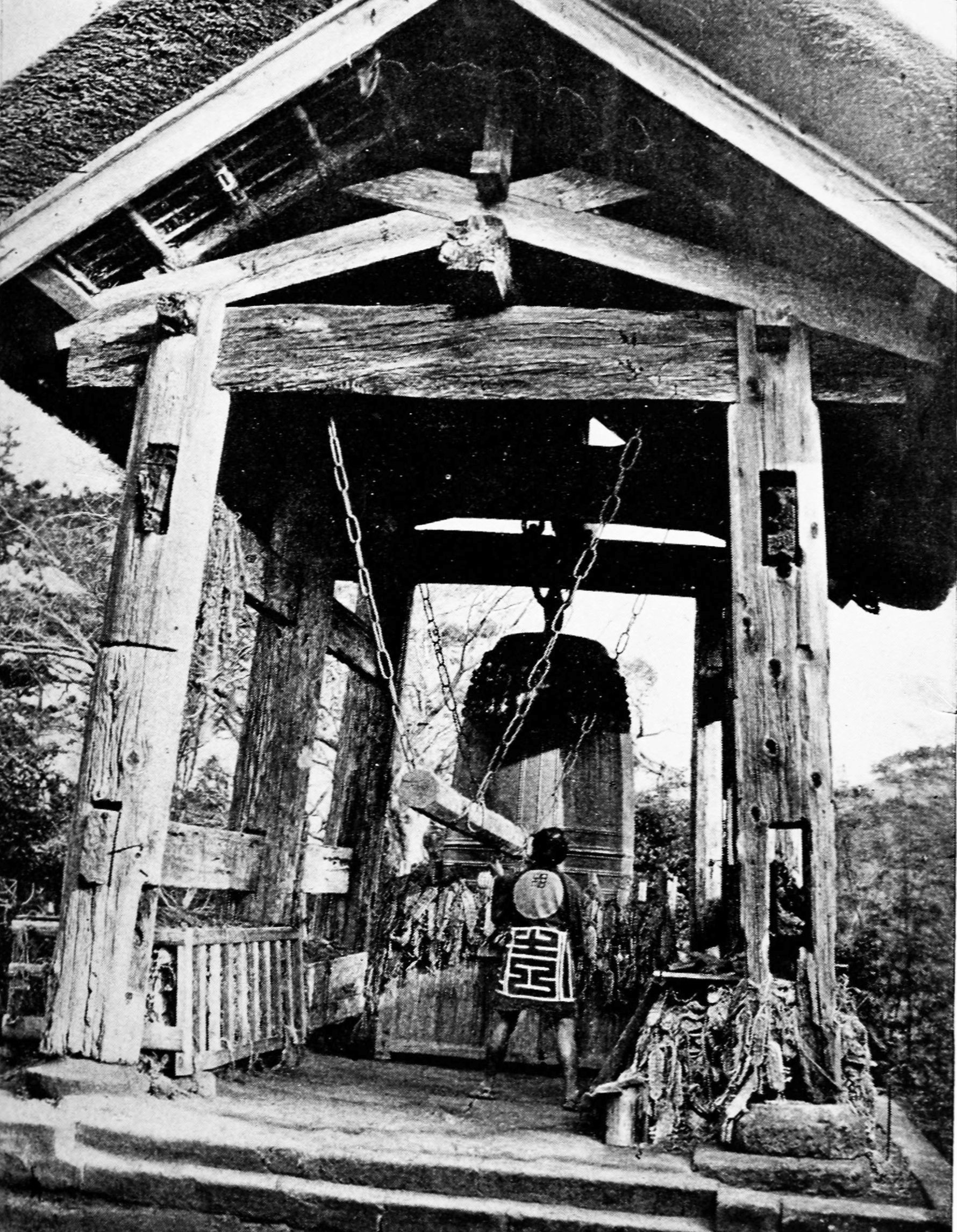 Bronze bell in Uyeno park Yokyo